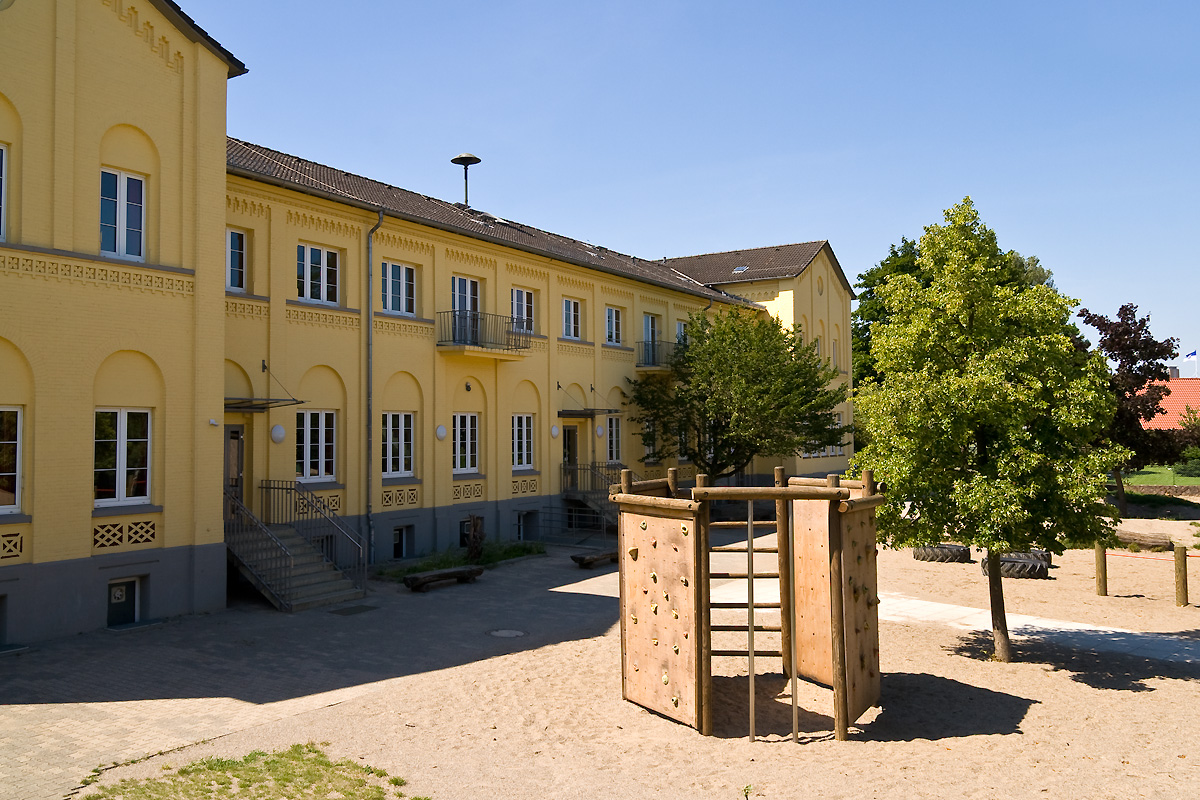 Die Grundschule in Hohnstorf (Elbe) befindet sich seit 1959 im ursprünglichen Empfangsgebäude des Bahnhofes Hohnstorf. Der Bahnhof wurde zwischen 1862 und 1864 als Zoll- und Endbahnhof der Zweigbahn Lüneburg–Hohnstorf an der Lauenburg-Hohnstorfer Elb-Traject-Anstalt gebaut. Das heute denkmalgeschützte Bahnhofsgebäude war zur damaligen Zeit nach dem Bahnhof Hannover das zweitgrößte der Königlich Hannoverschen Staatseisenbahn. Wo sich heute der Schulhof befindet, lagen früher die Gleise.